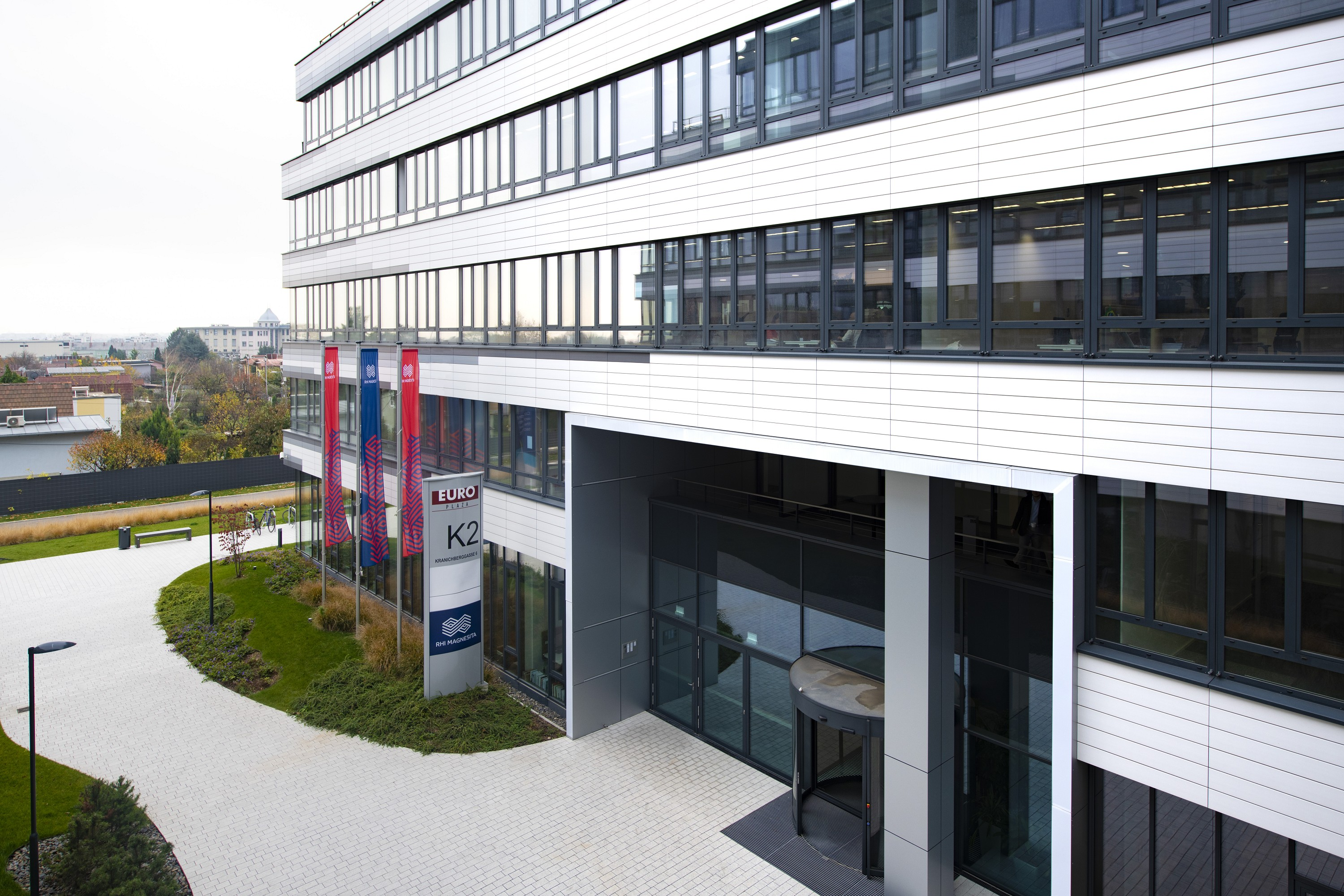 RHIM Vienna